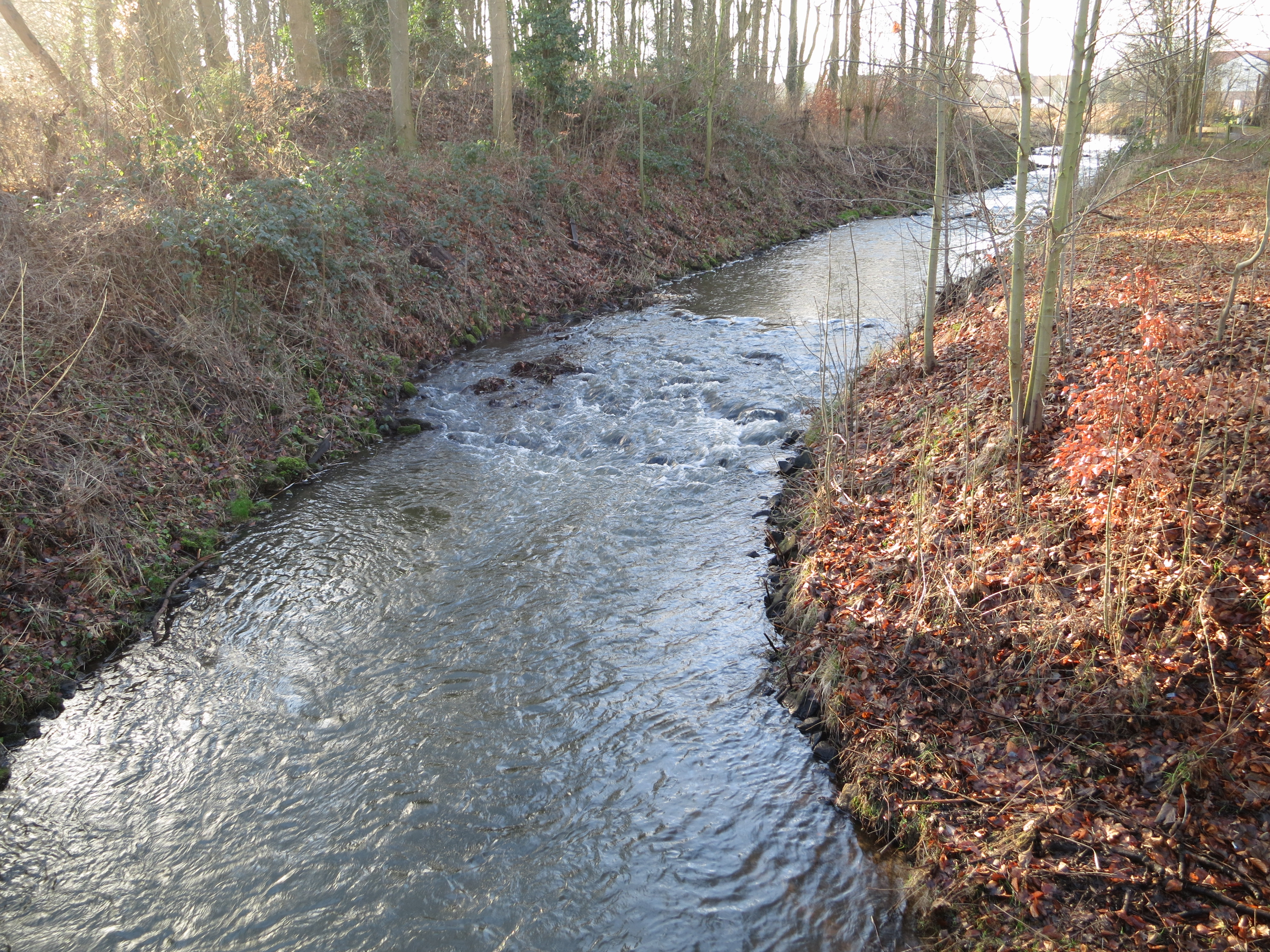 Hache in Weyhe-Sudweyhe von der Straße "Im Mühlengrunde" nach Westsüdwesten gesehen